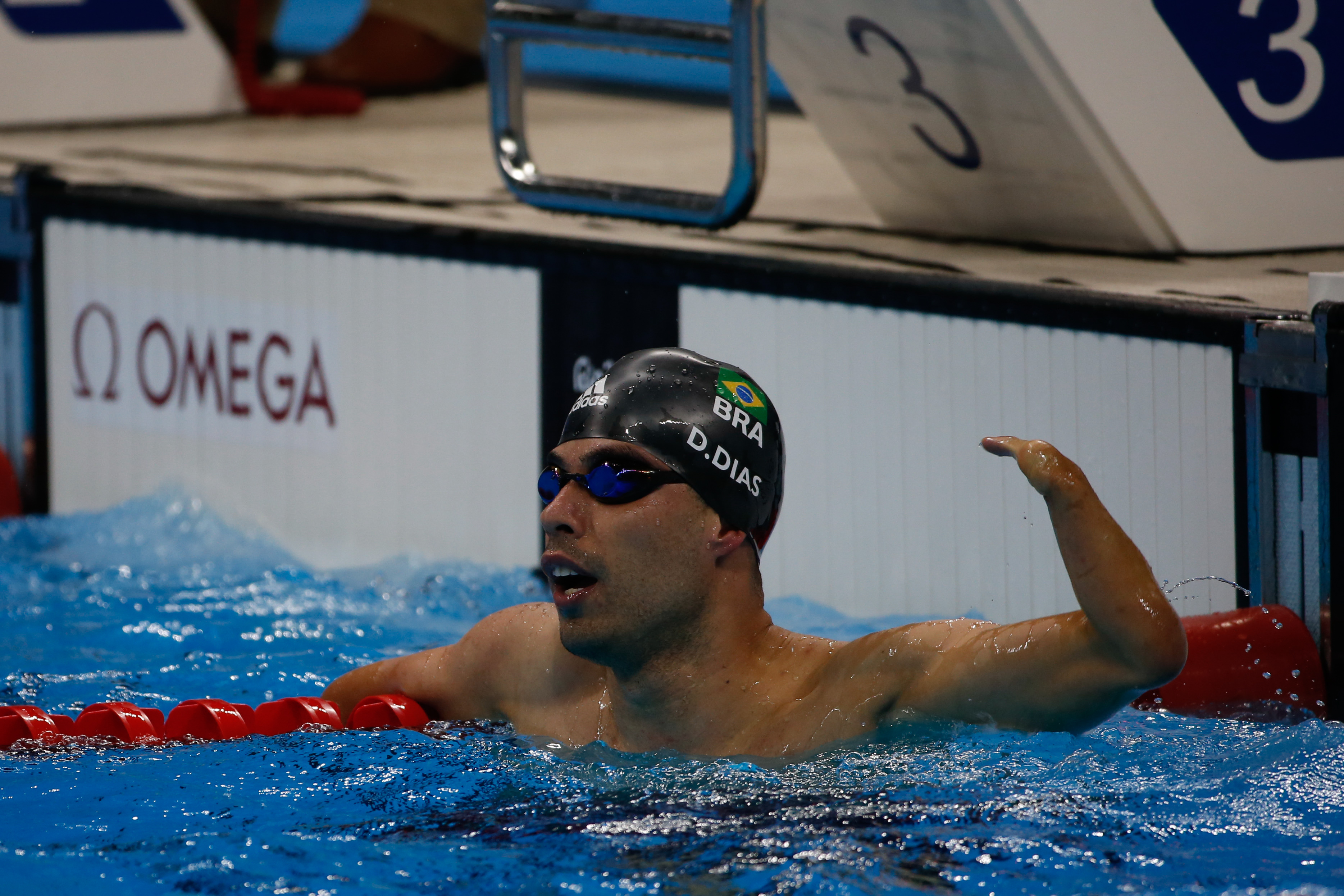 Rio de Janeiro - Brasileiro Daniel Dias leva medalha de ouro nos 50m nado livre S5 nos Jogos Paralímpicos Rio 2016, no Estádio Aquático. (Fernando Frazão/Agência Brasil)